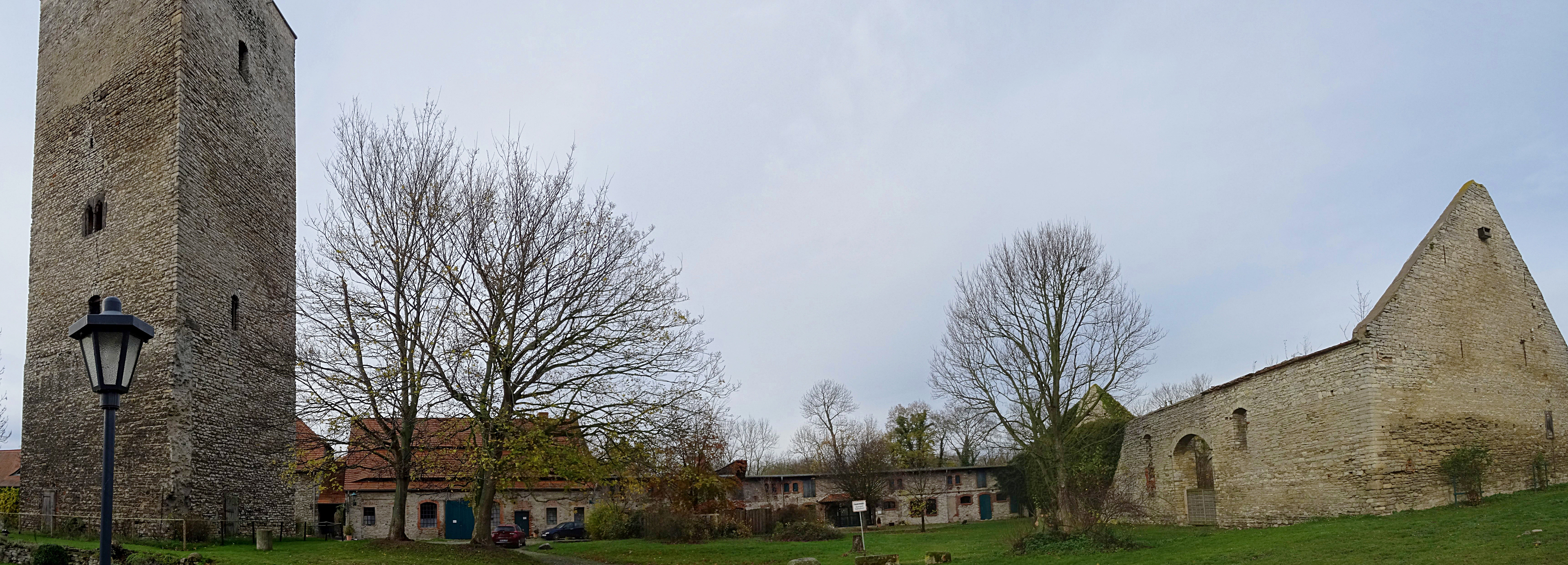 im Burghof von Burg Wanzleben